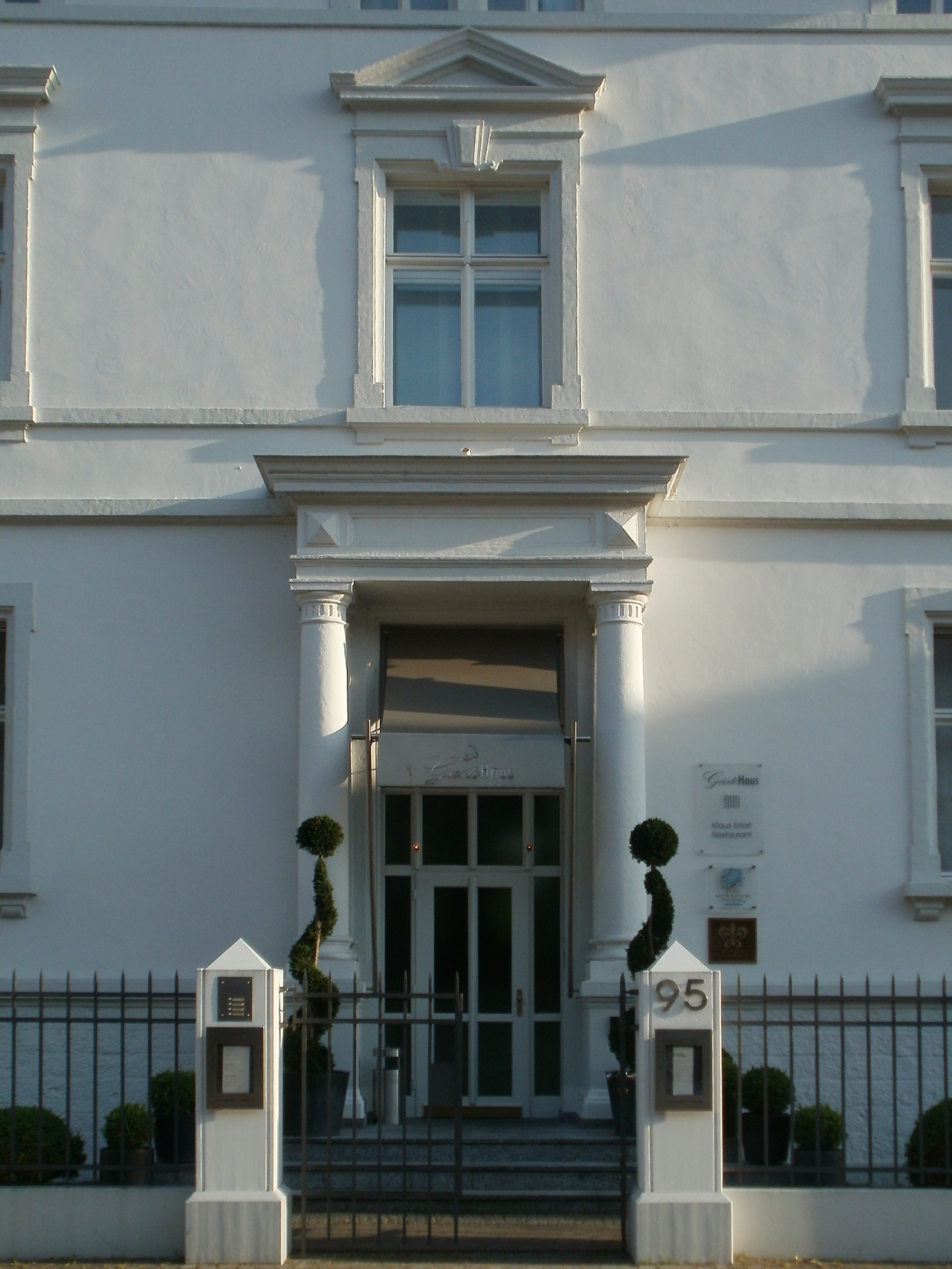 Mainzer Straße 95 (Saarbrücken)